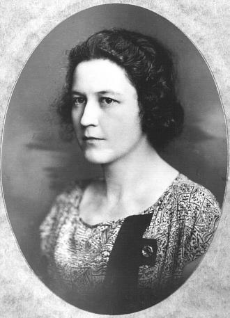 Božena Štúrová-Kuklová (1893 - 1977), česká lékařka